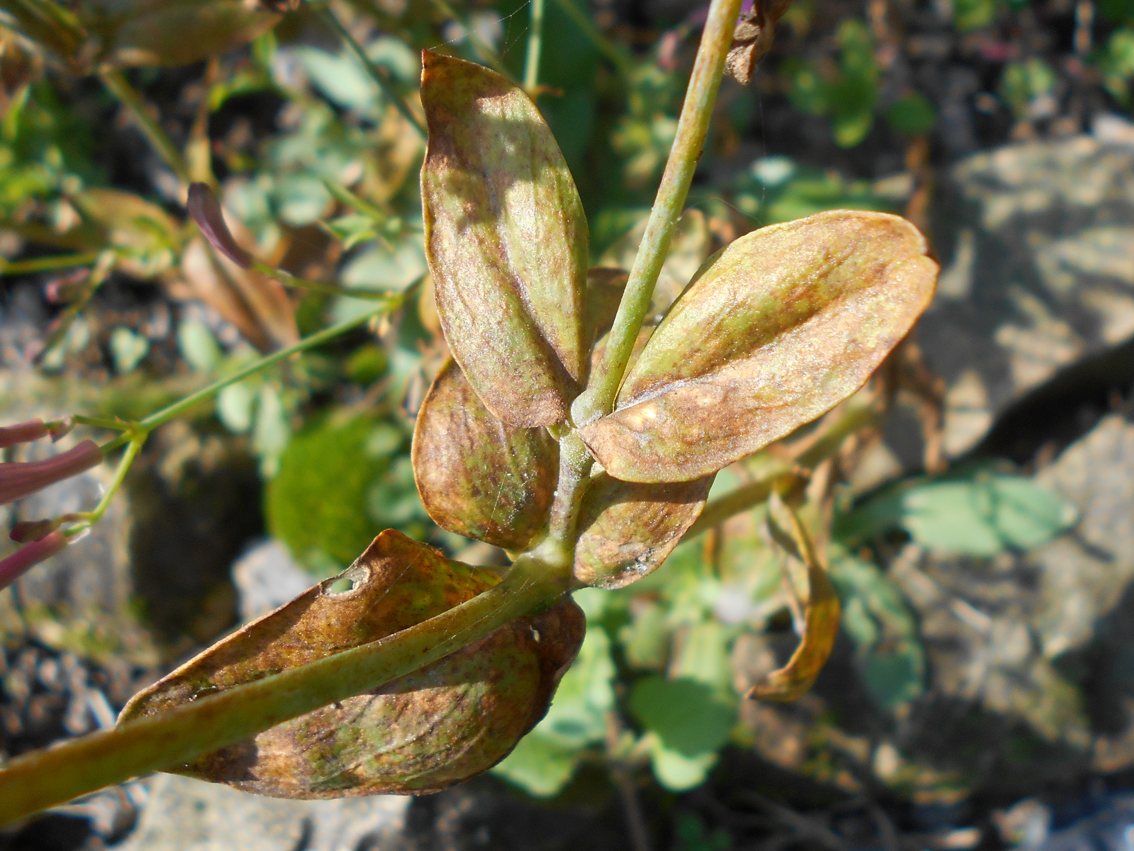 Lepnica litewska (Silene lithuanica), Ogród Botaniczny UMCS w Lublinie.